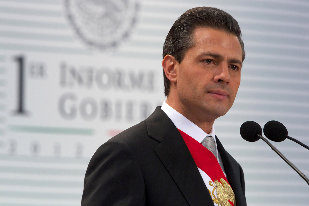 Enrique Peña Nieto. 1er. Informe de Gobierno. Residencia Oficial de los Pinos, Ciudad de México. 02 de septiembre de 2013.